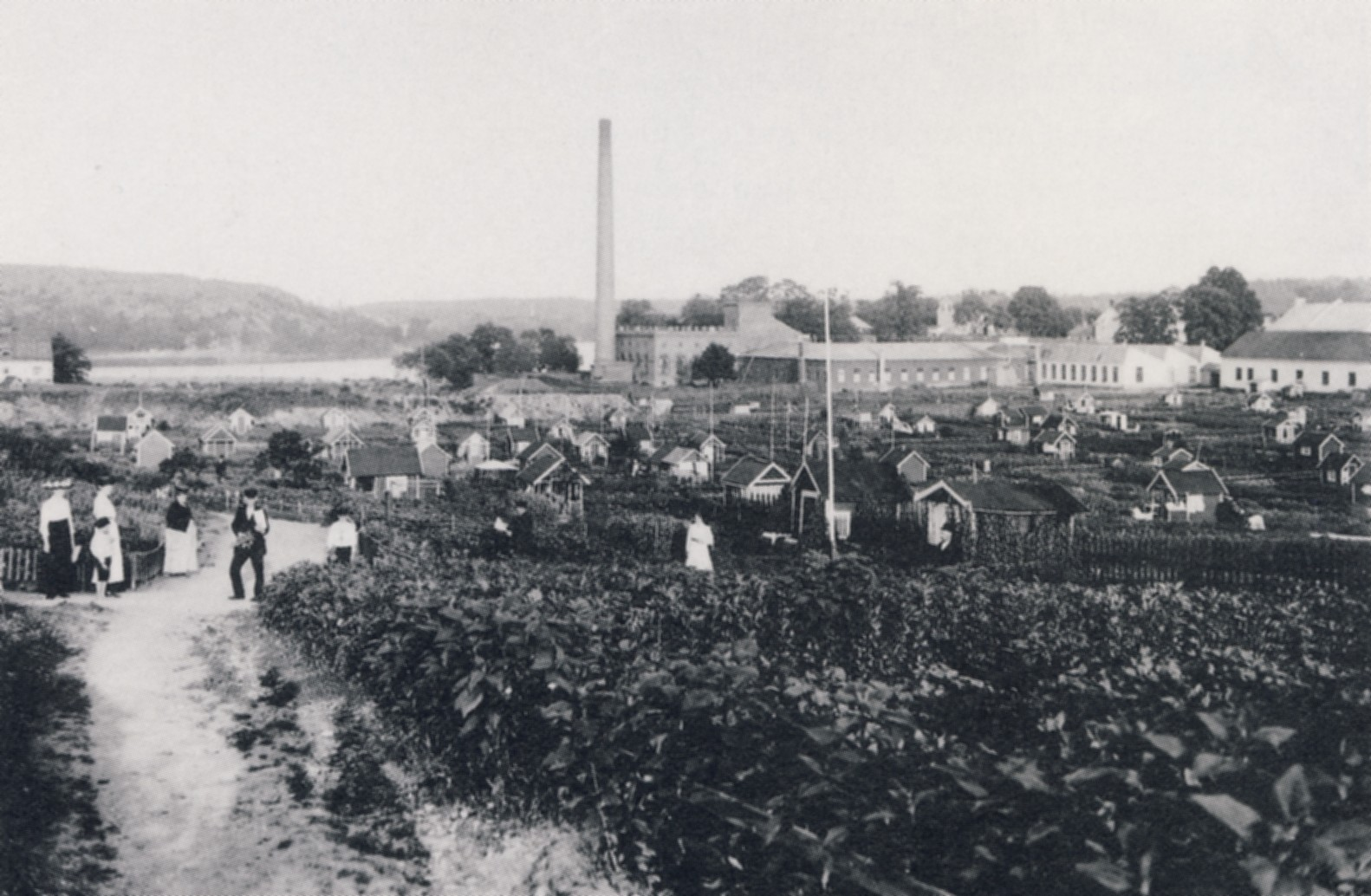 Barnängens koloniområde på Södermalm i Stockholm med Stockholms Bomullsspinneri & Väfveri i bakgrunden